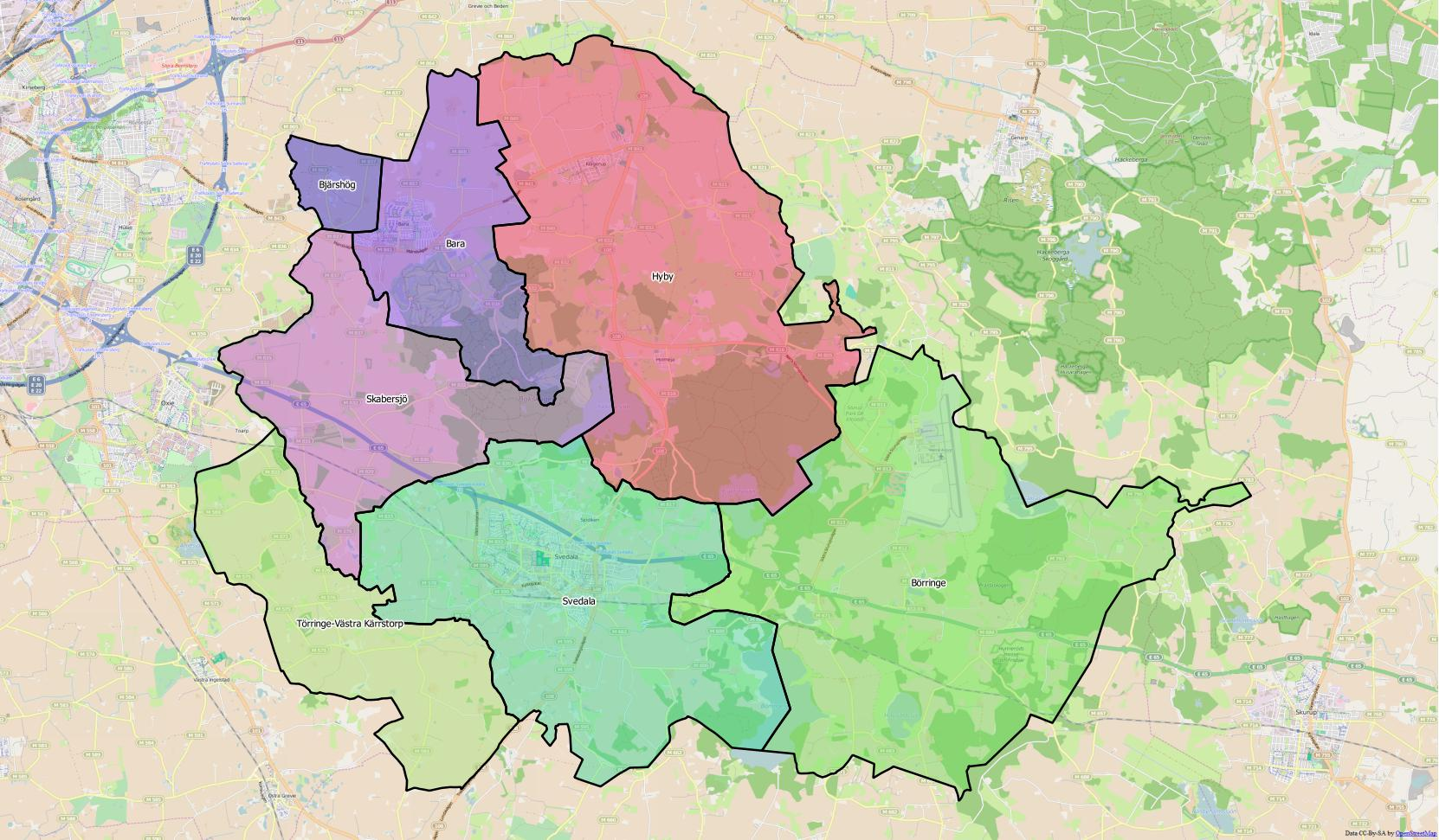 Distriktsindelningen i kommunen.